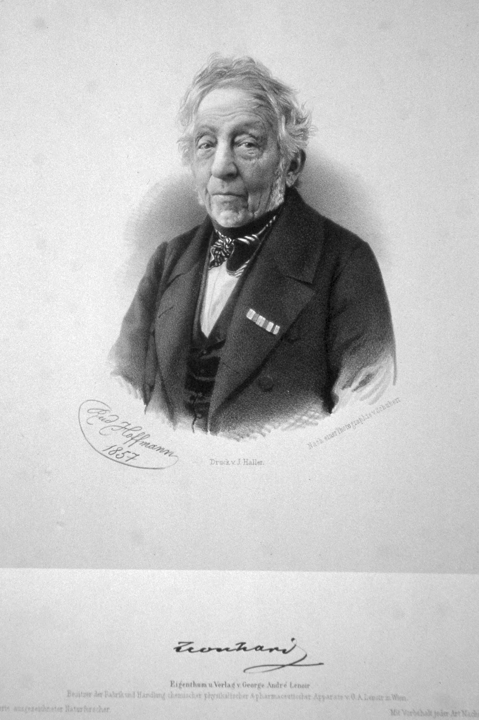 Karl Cäsar Leonhard, Lithographie von Rudolf Hoffmann, 1857. Nach einer Fotografie von Schubert